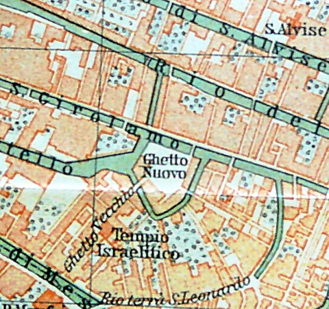 Karl Baedeker: l'Italie des Alpes à Naples. 2e éd. Leipzig: Baedeker 1905. Map of Venice, detail: Ghetto of Venice